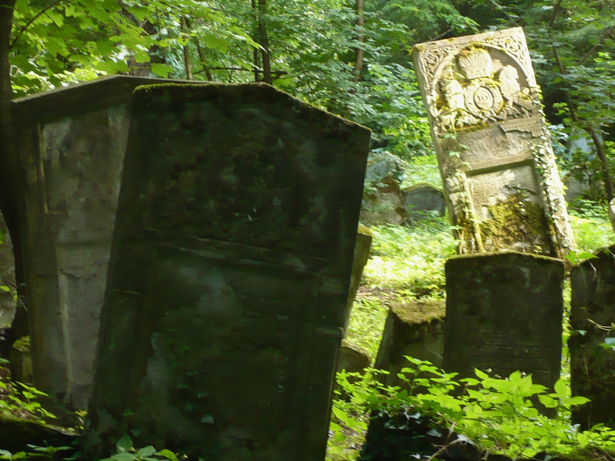 Przemyśl, nowy cmentarz żydowski